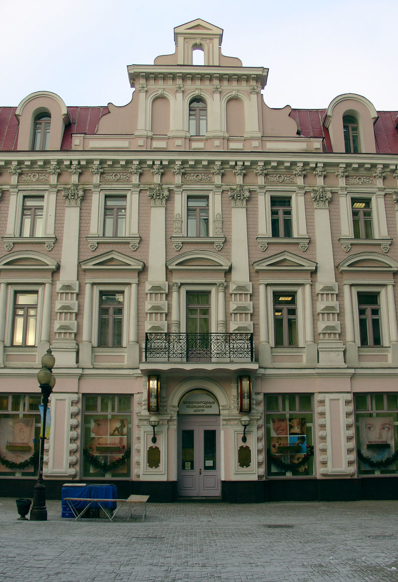 Arbat Street, Moscow. Architect: Anatoly Ostrogradsky // Остроградский, Анатолий Александрович (1872 - after 1945)